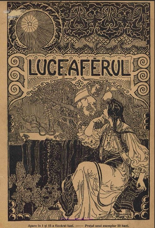 Revista Luceafarul nr. 1, 1902